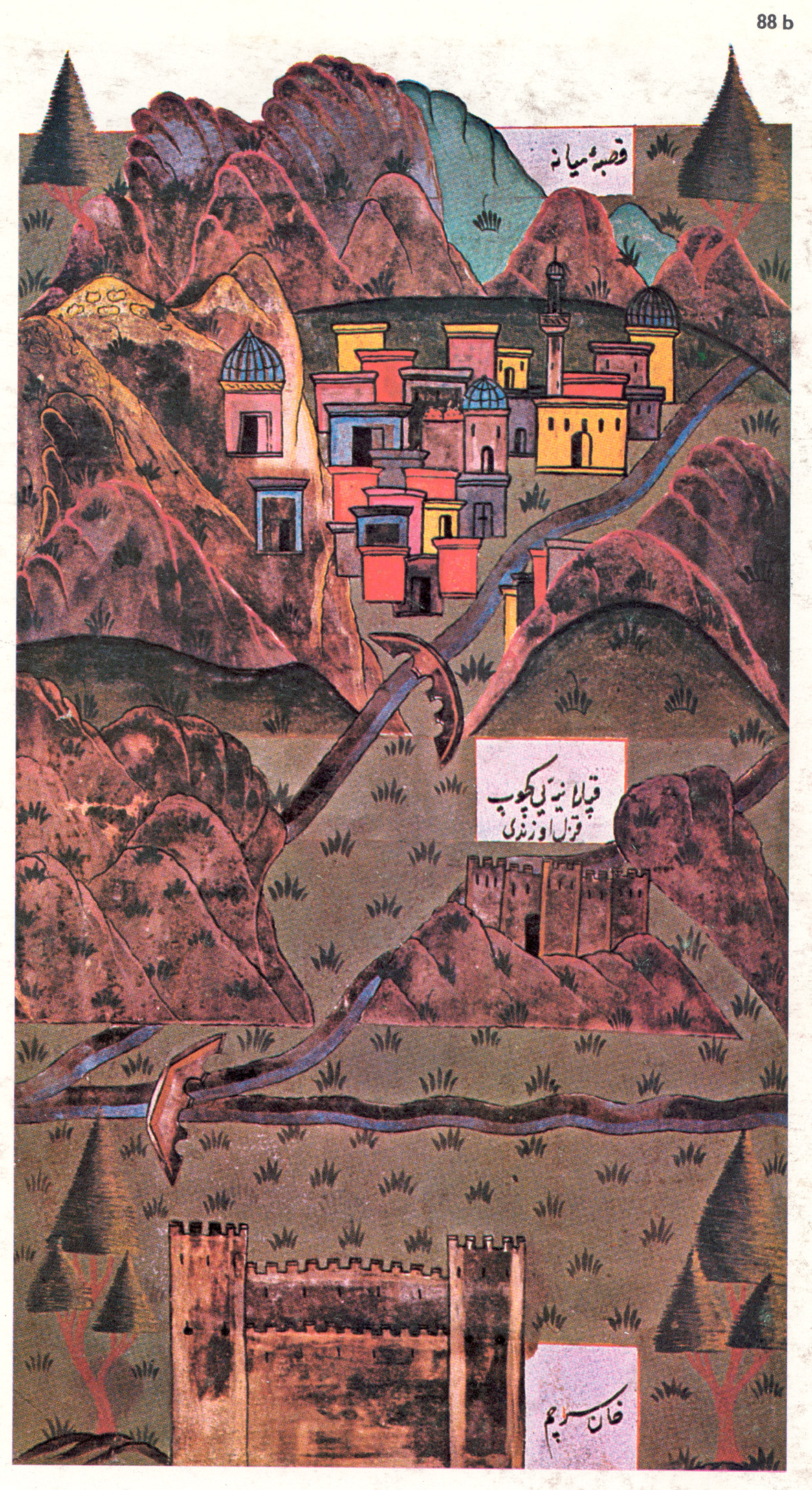 16th century map of Miyaneh, East Azarbaijan, Iran قصبهٔ میانه/ از قپلانیه (قافلان کوه) گذشته، قزل اوزن/ خان سرچم